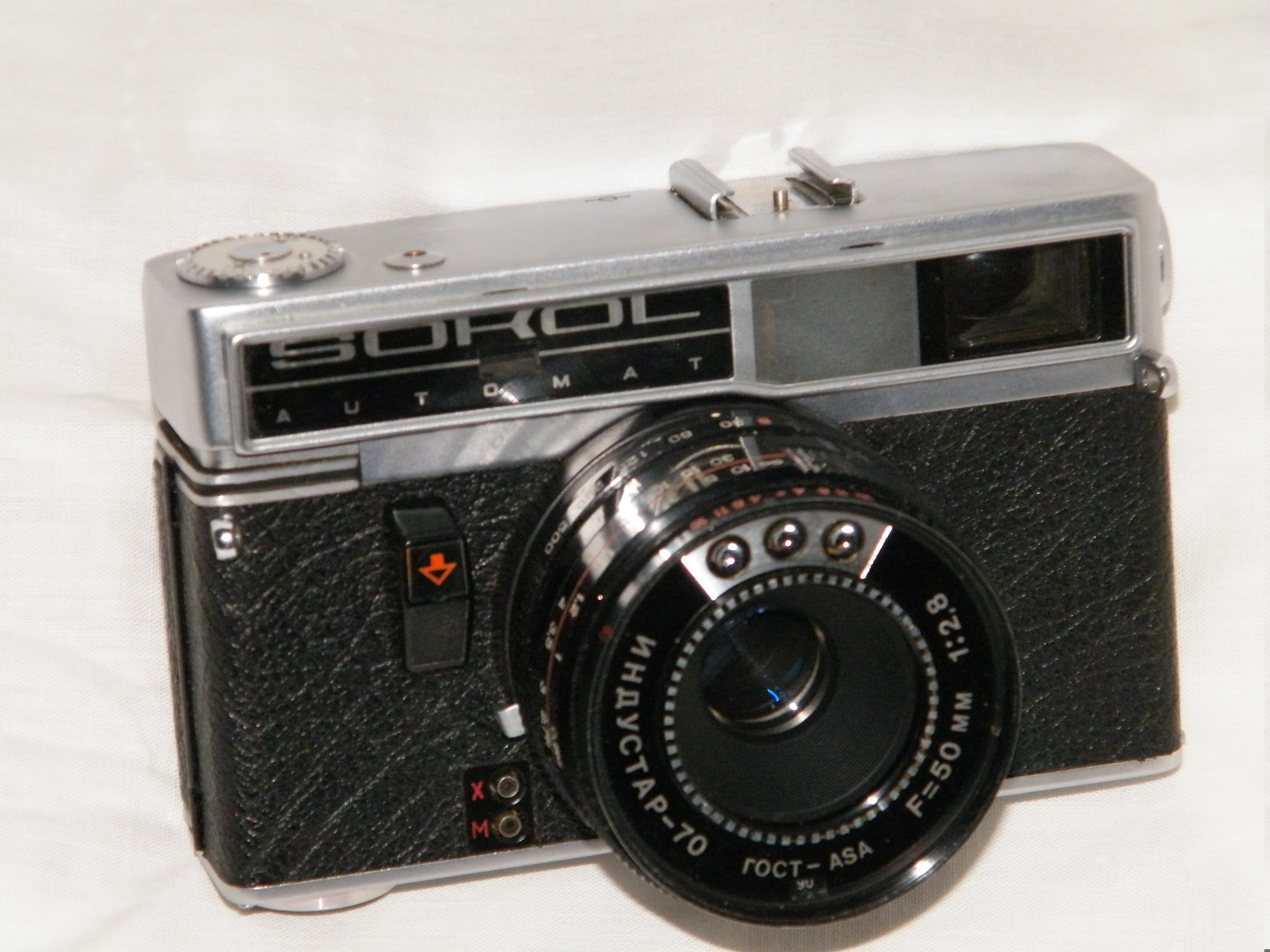 фотоаппарат Сокол 1977 г